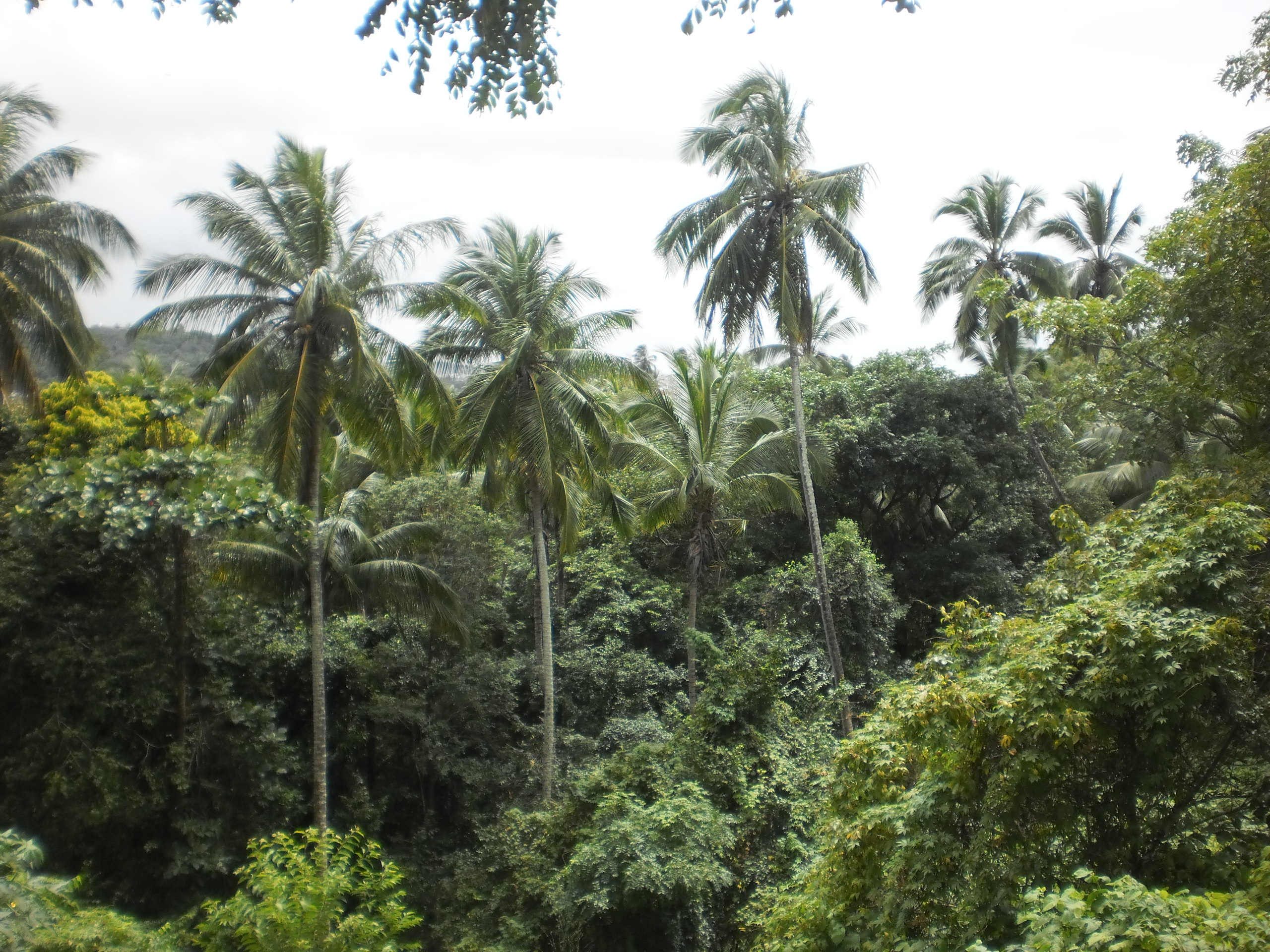 Espécies nativas de Mata Atlântica em Olinda - Pernambuco, Brasil.